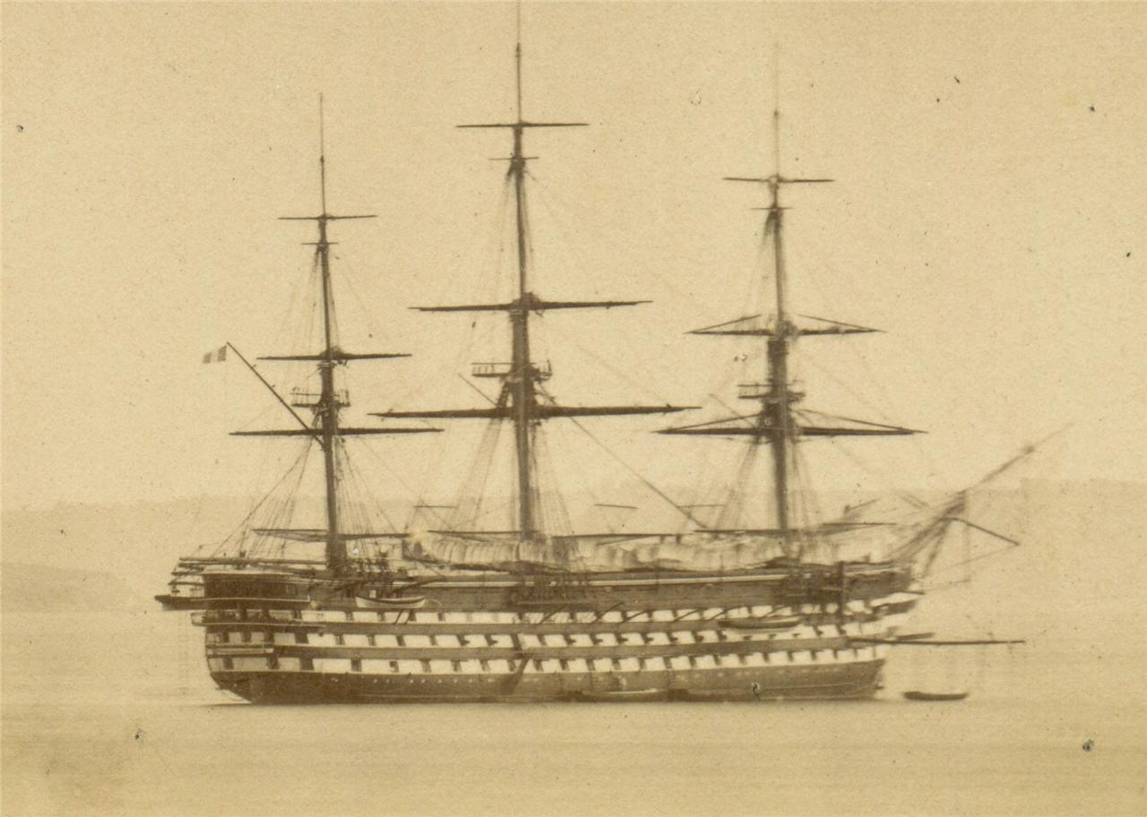 Détail daguerrotype de la Bretagne à Brest vers 1860